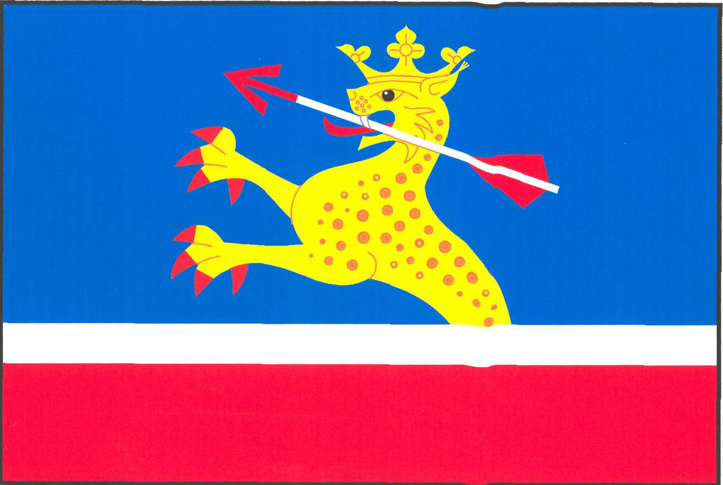 Vlajka obce Hlohová